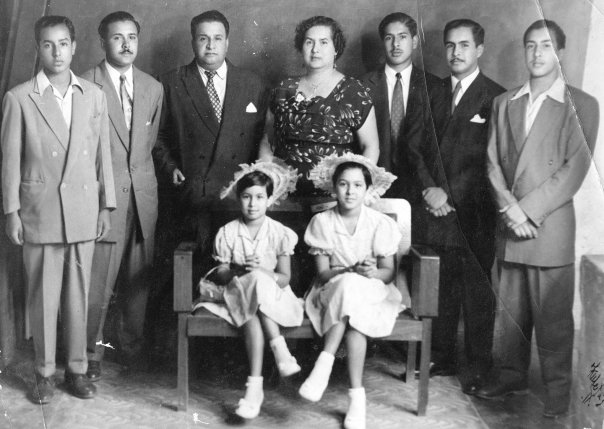 Familia Quevedo Terán, capturada en el año 1953. El segundo de derecha a izquiera es el reconocido médico Capitan de Bomberos Cronista y poeta Jesús Quevedo Terán.